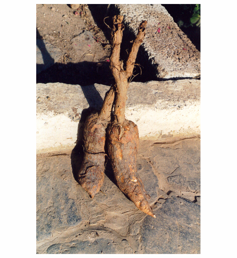 Mandragorae radix